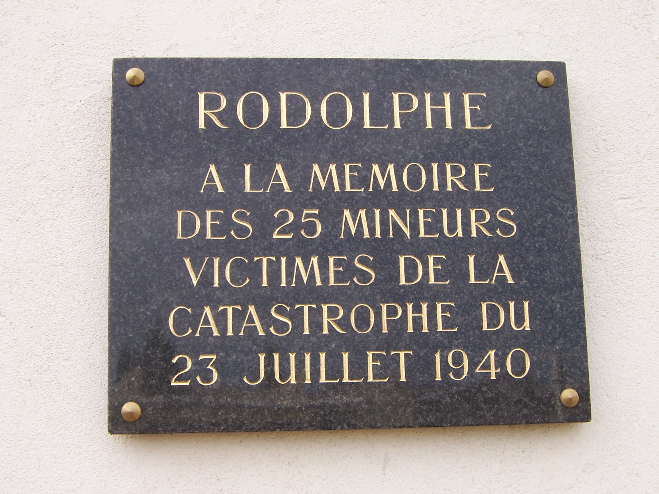 Plaque commémorative de l'explosion du 23 juillet 1940. (A la mine Rodolphe à Ungersheim, Haut-Rhin, Alsace, France.)